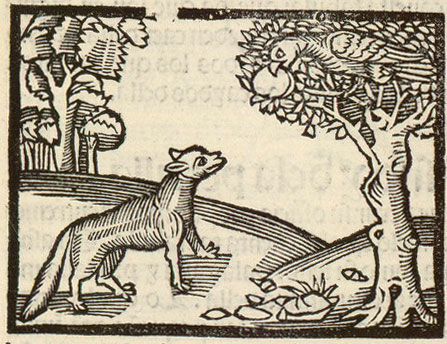 Illustration dans Libro del sabio [et] clarissimo fabulador Ysopu hystoriado [et] annotado. Sevilla, 1521. Library of Congress